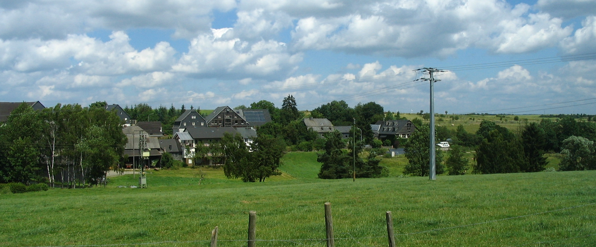 Schwerbach in the Hunsrueck region, Germany